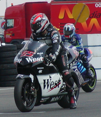 Loris Capirossi, GP Brno 2002